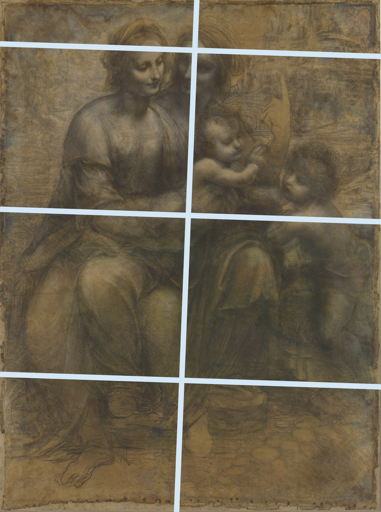 Repérage des 8 feuillets composant le carton